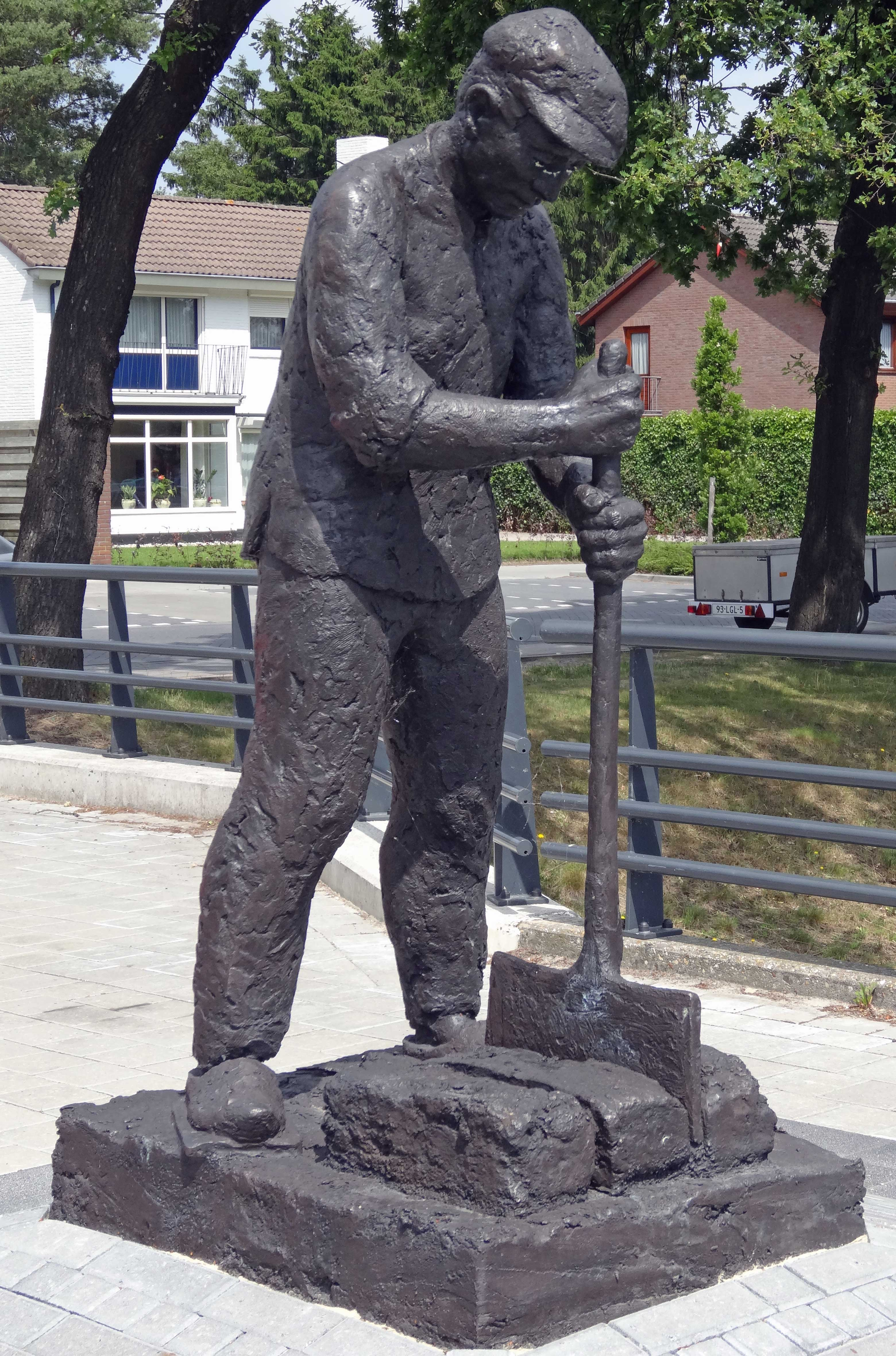 De Veenarbeider door Bert Kiewiet (ontwerp 2008) en Egbertje Kiewiet (vergroting 2009)